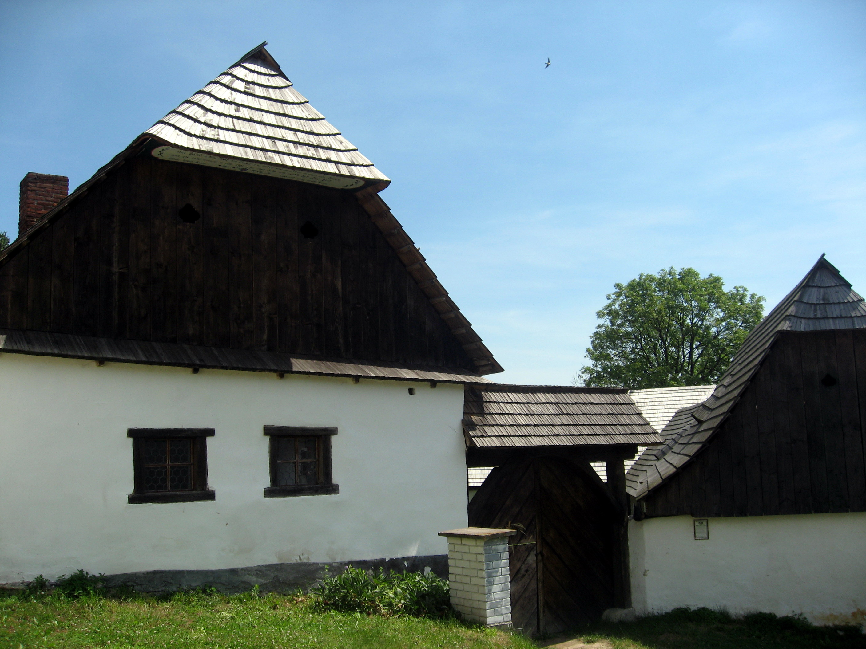 Pohleď, dříve Horní Pohleď